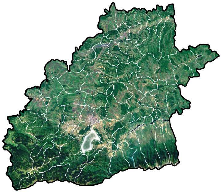 Cisnadie jud Sibiu.